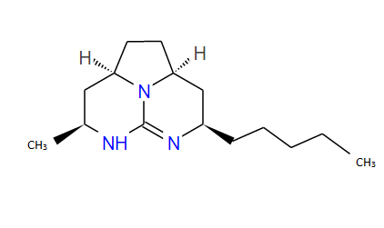 batzelladina K